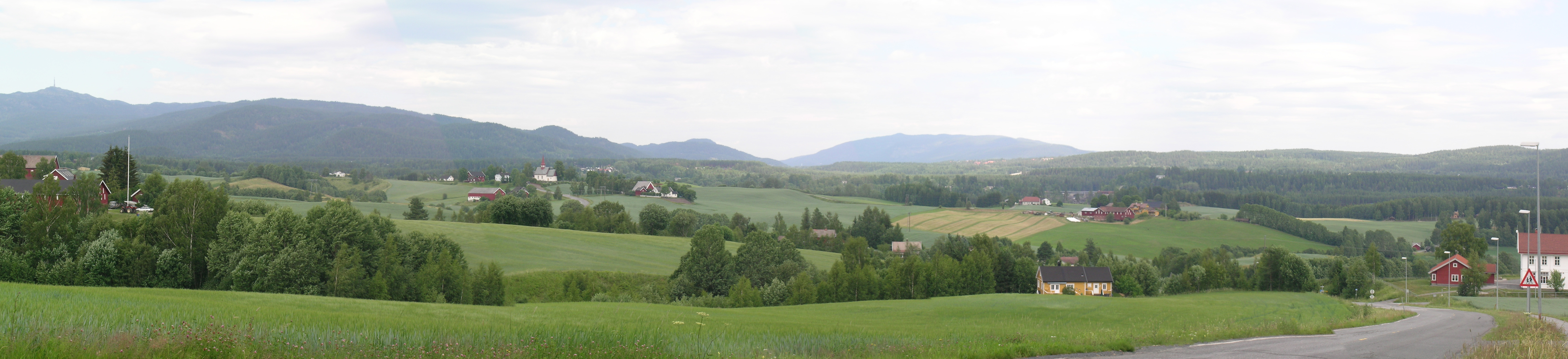 View on Hedenstad, Øvre Sandsvær, Kongsberg, Norway.